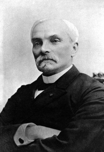 Frenc mineralogist François Ernest Mallard (1833-1894)